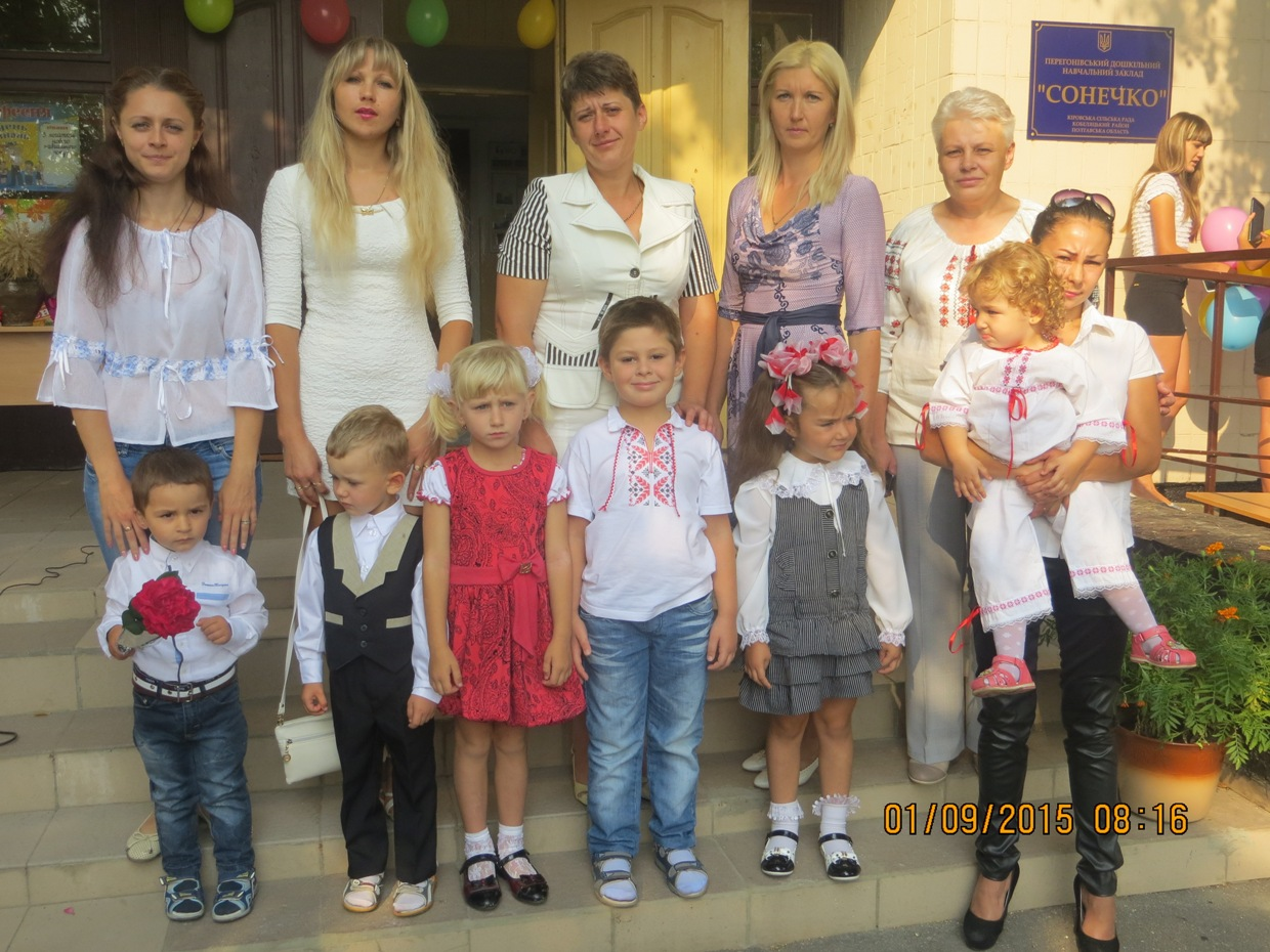 Дитсадок Сонечко